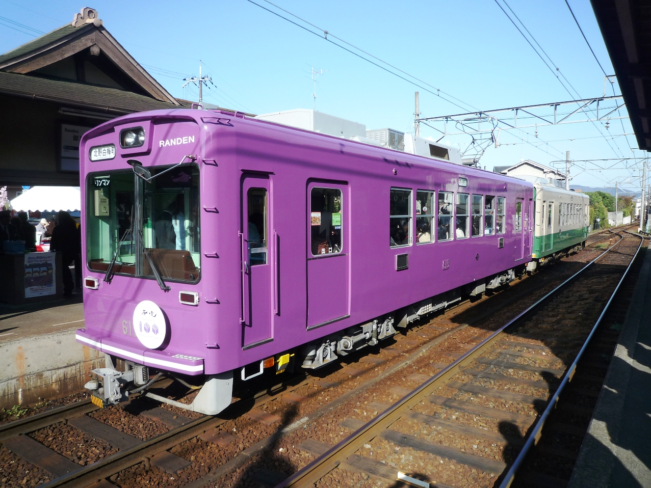 京福電気鉄道モボ611形613号車の新塗色車。御室仁和寺駅に停車中の帷子ノ辻駅発の北野白梅町駅行き。前方に併結されているのもモボ611形。2010年4月17日に投稿者が撮影。